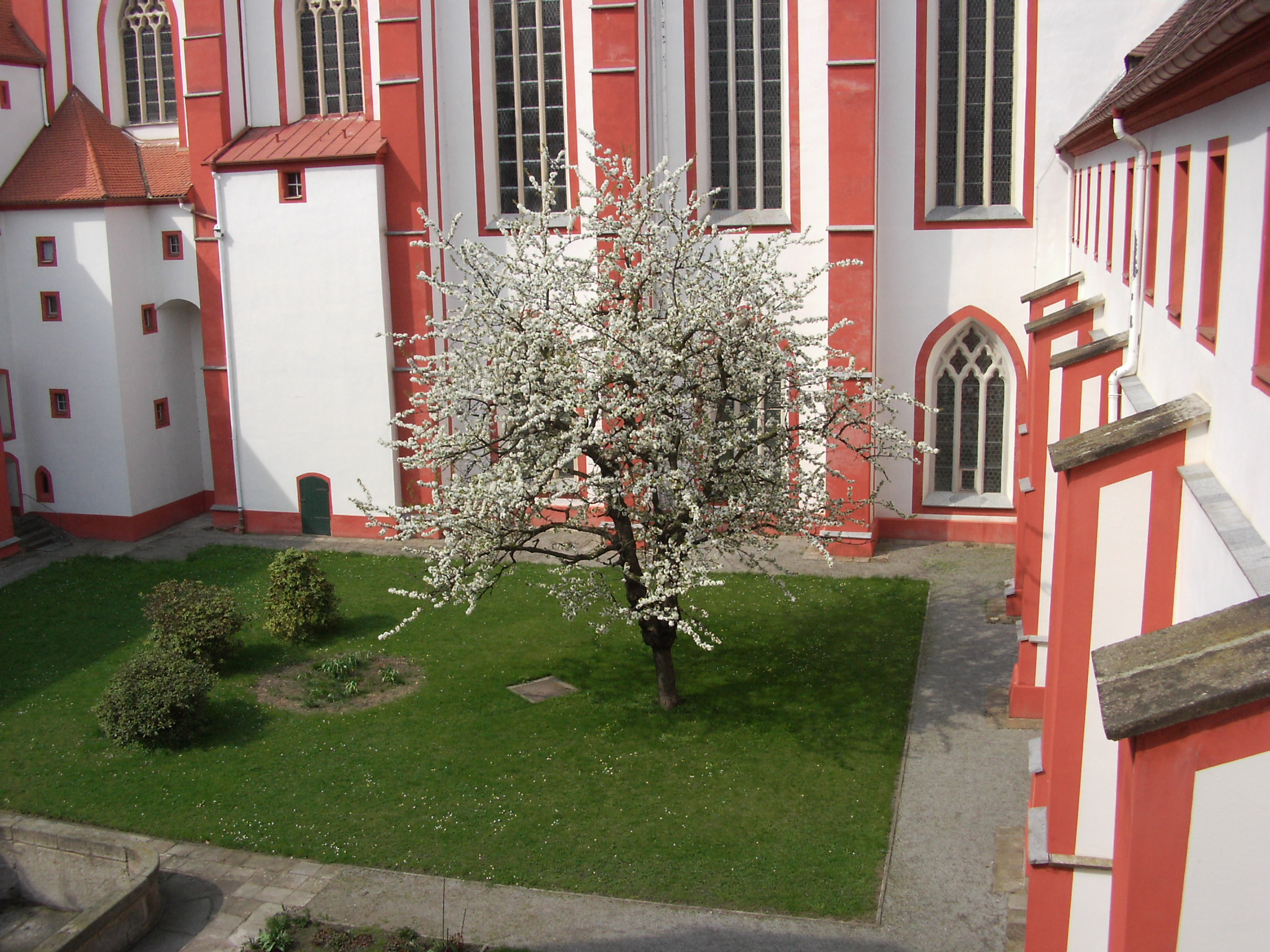 Jardín en el claustro del monasterio cisterciense St. Marienstern, Panschwitz-Kuckau, Alemania